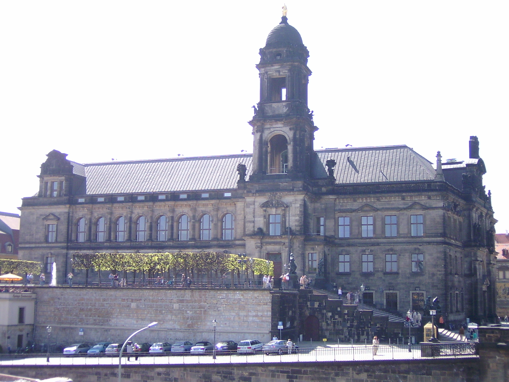 Ständehaus in Dresden, heute Sitz des OLG Dresden